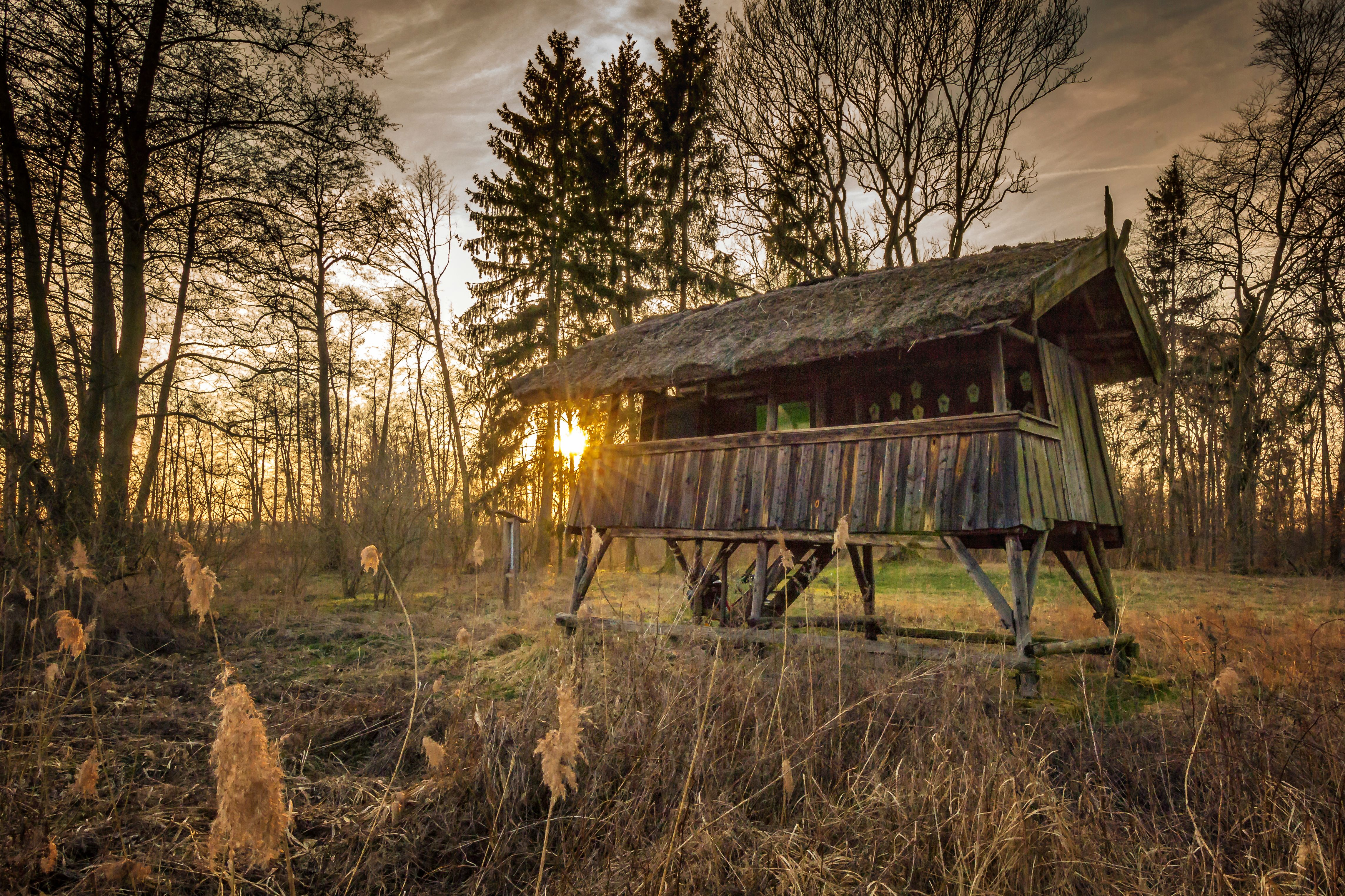 Nabu Naturschutzgebiet